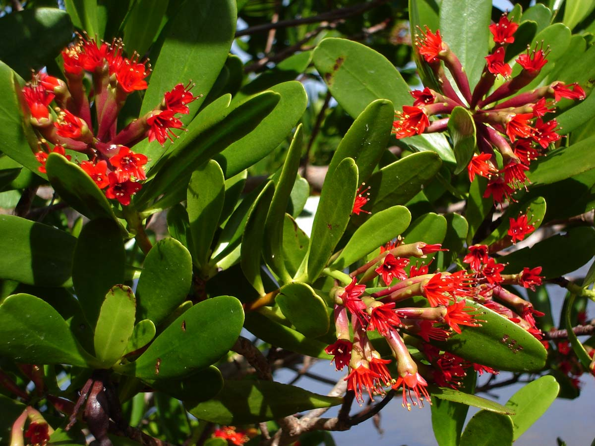 Lumnitzera littorea; (hangale) swamp plant in Tonga